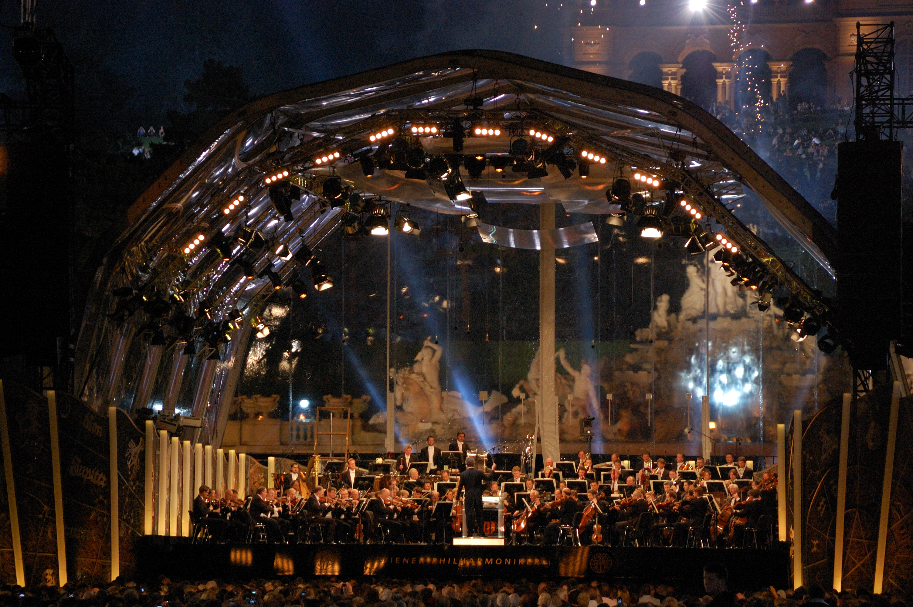 Sommernachtskonzert 2010